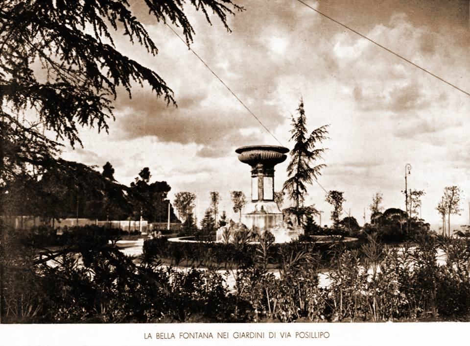 Napoli, Posillipo - Giardinetti di Piazza Salvatore De Giacomo da poco allestiti: fontana degli Incanti. Autore della foto sconosciuto.